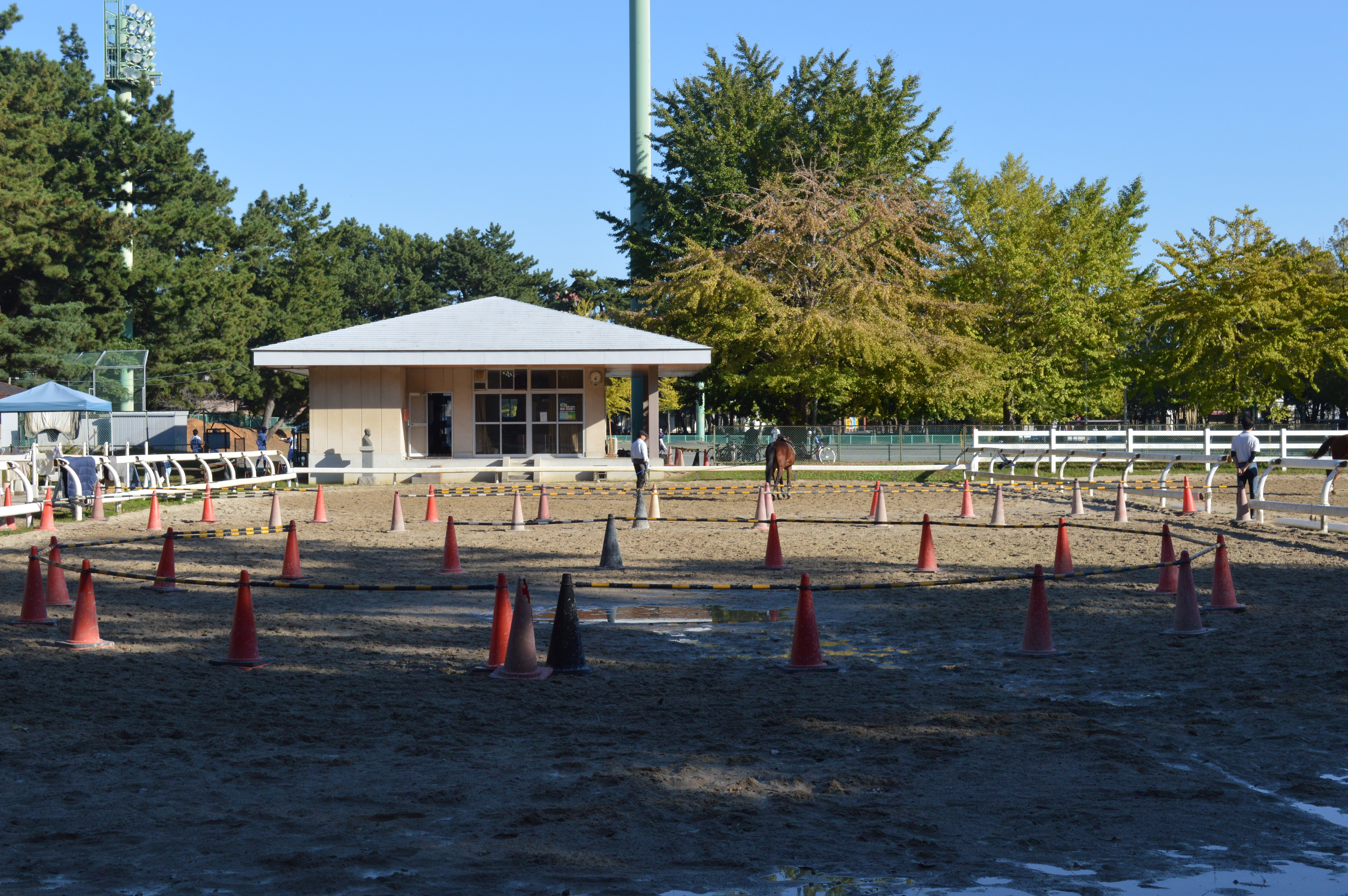 愛知県豊橋市の高師緑地にある馬場。